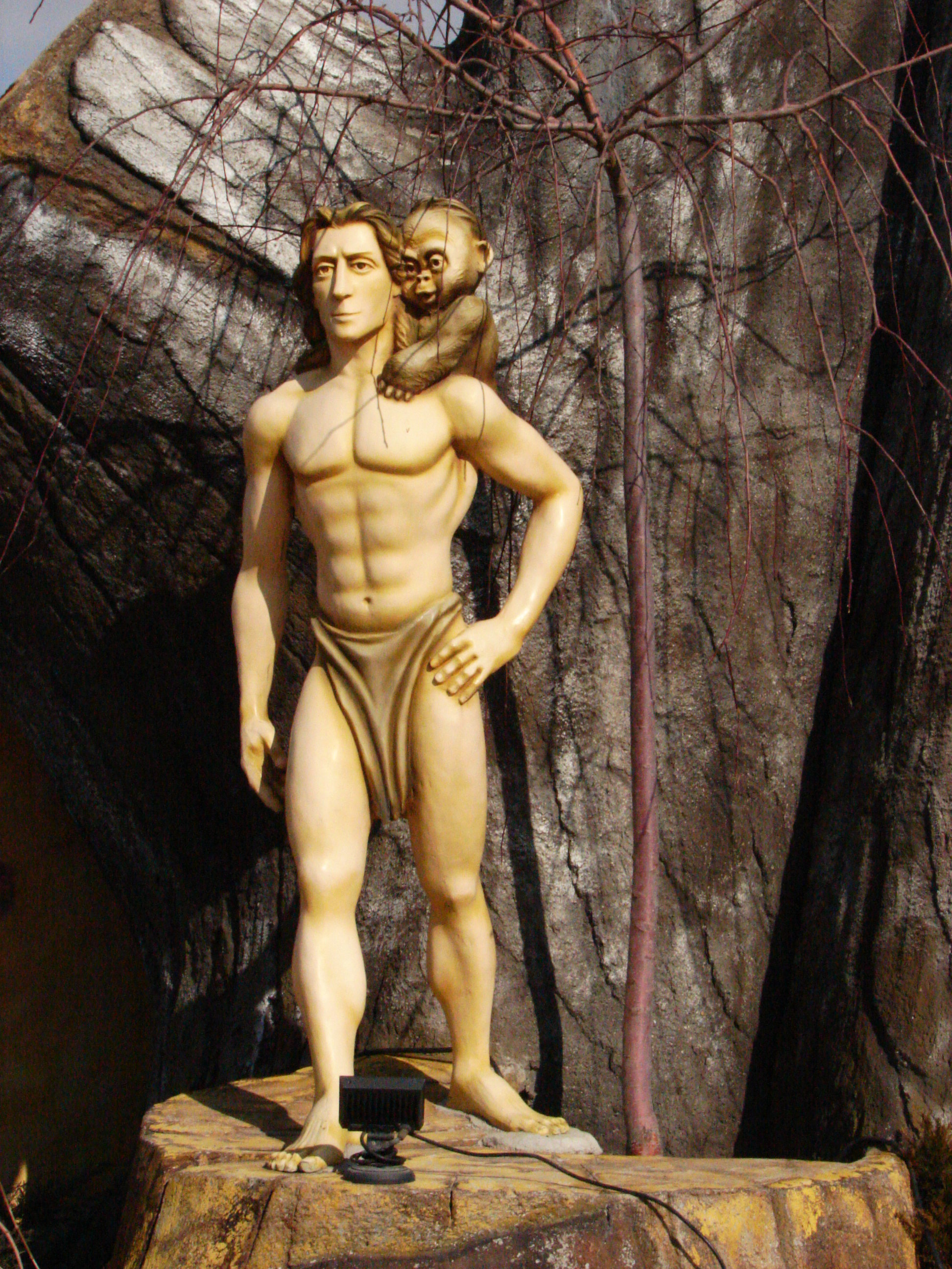 Ankara Amusement Park